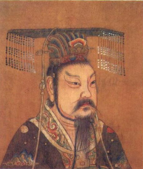 周昭王像，清人绘